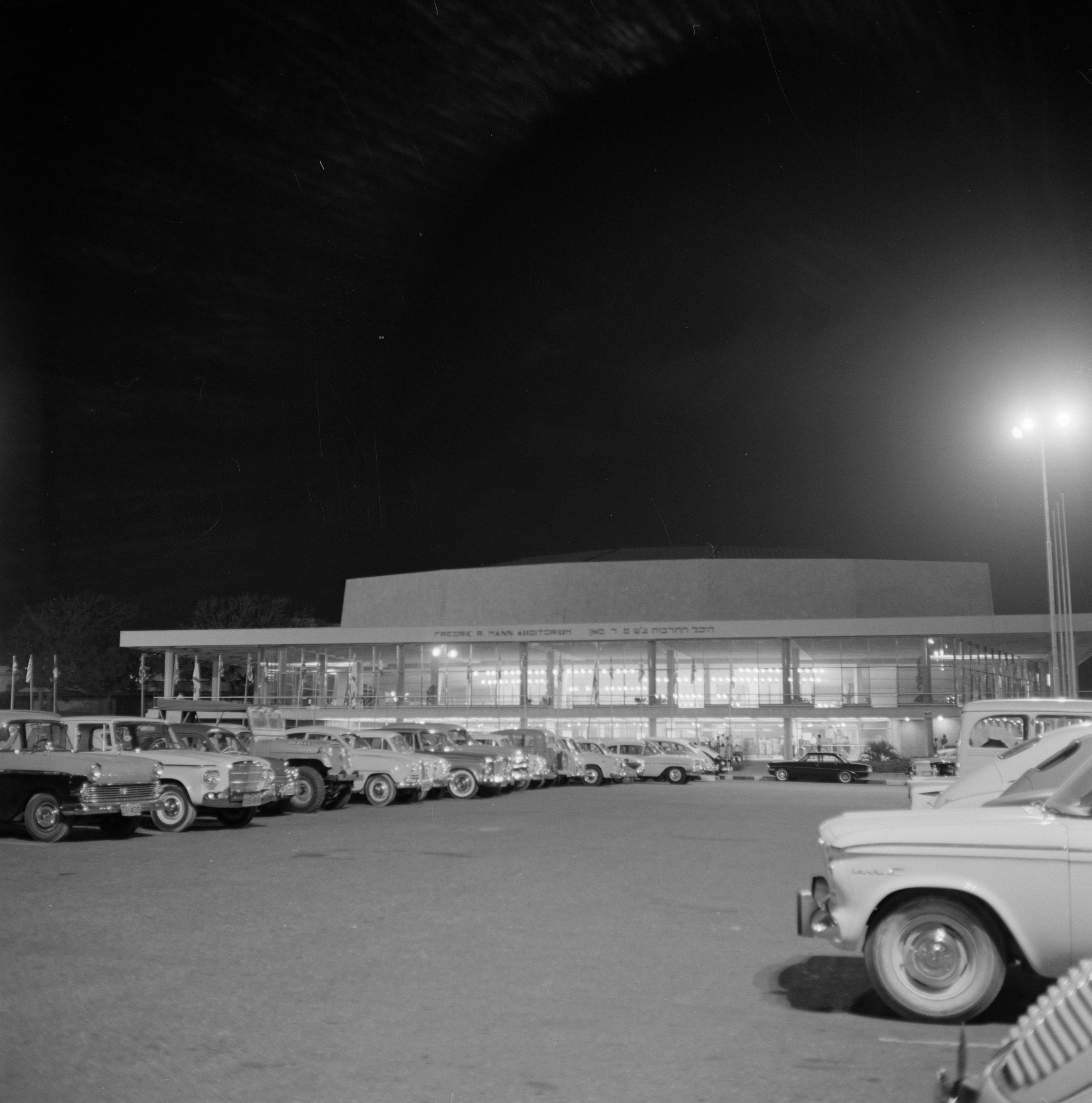 Collectie / Archief : Fotocollectie Van de Poll Reportage / Serie : [ onbekend ] Beschrijving : Tel Aviv. Frederic R. Mann Auditorium bij avond gezien vanaf het parkeerterrein voor het gebouw Datum : 1 januari 1964 Locatie : Israël, Tel Aviv Trefwoorden : Nachtopnames, architectuur, auto's, ramen, schouwburgen Persoonsnaam : Mann, Frederic R. Fotograaf : Poll, Willem van de, [onbekend] Auteursrechthebbende : Nationaal Archief Materiaalsoort : Negatief (zwart/wit) Nummer archiefinventaris : bekijk toegang 2.24.14.02 Bestanddeelnummer : 255-4552